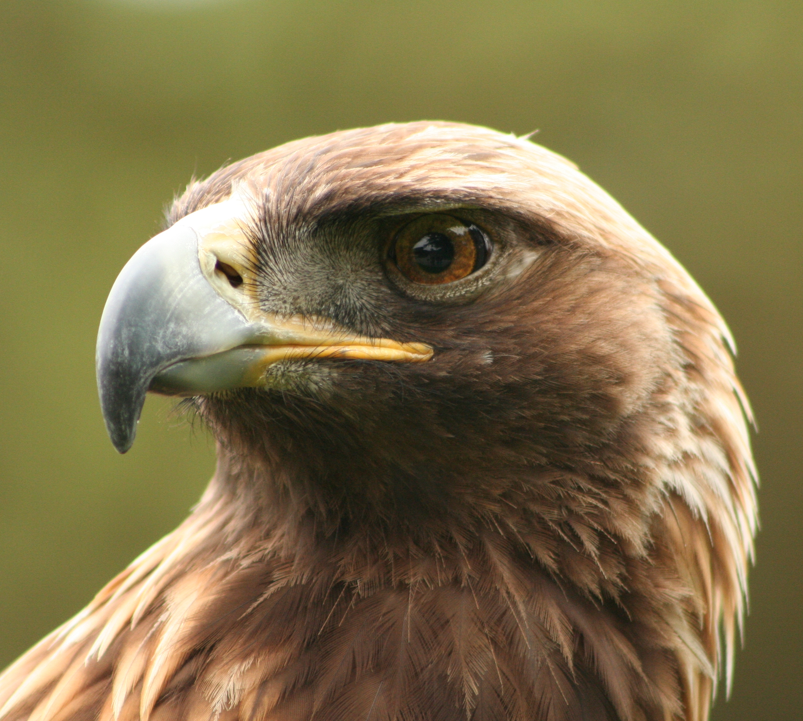 Aquila chrysaetos